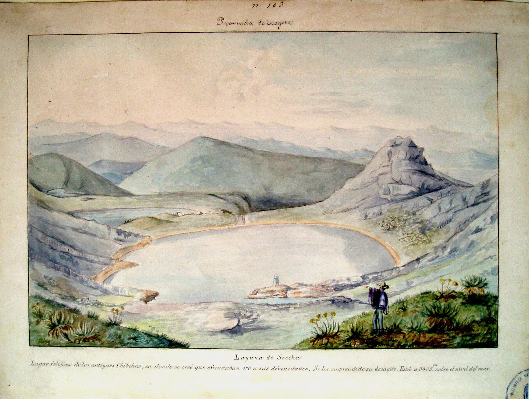 Lagunas de Siecha, Lámina 103 de la Comisisón Corográfica, 8.